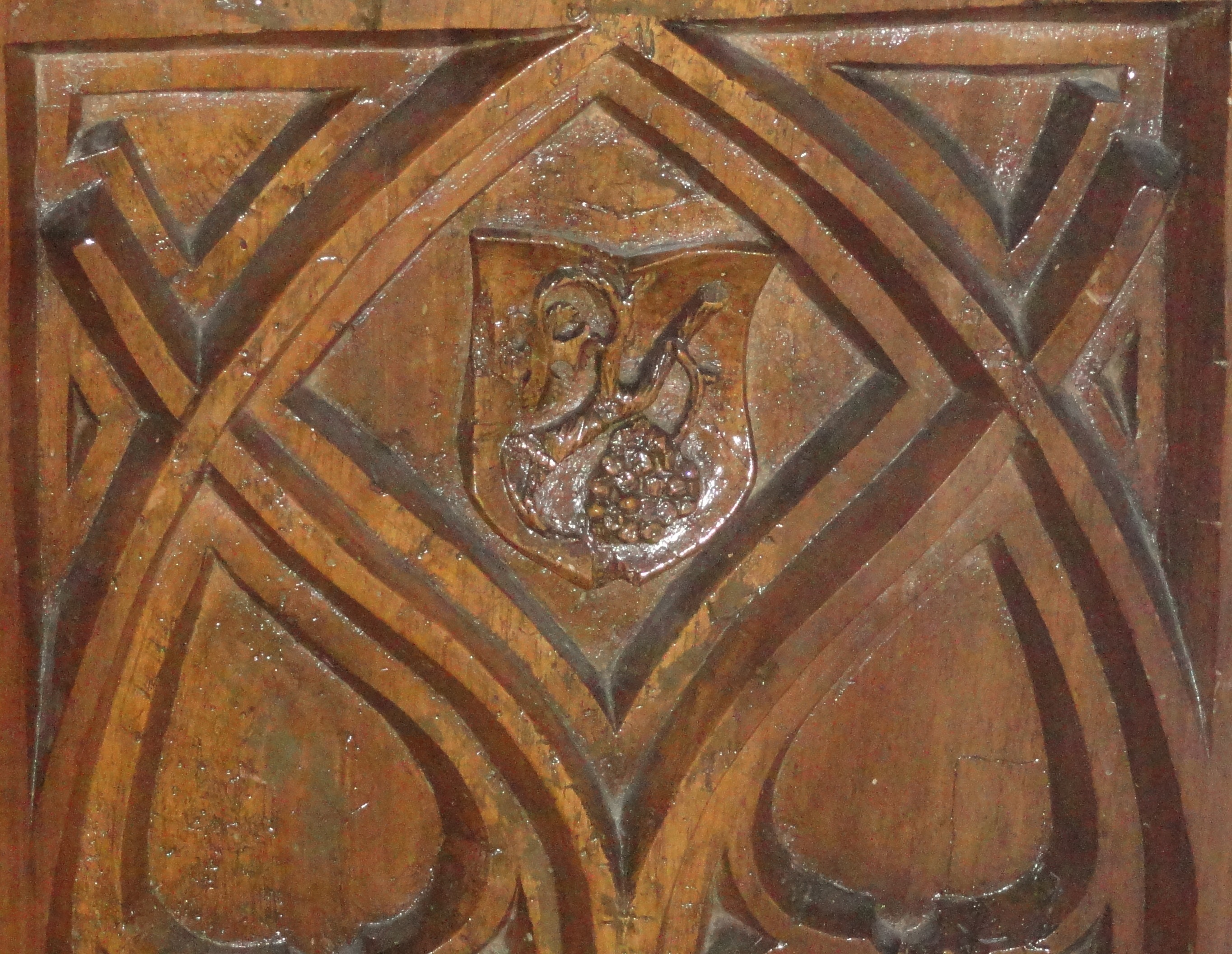 Reformierte Kirche Küsnacht: Wappen des Komturs Marti am Chorgestühl Innenraum